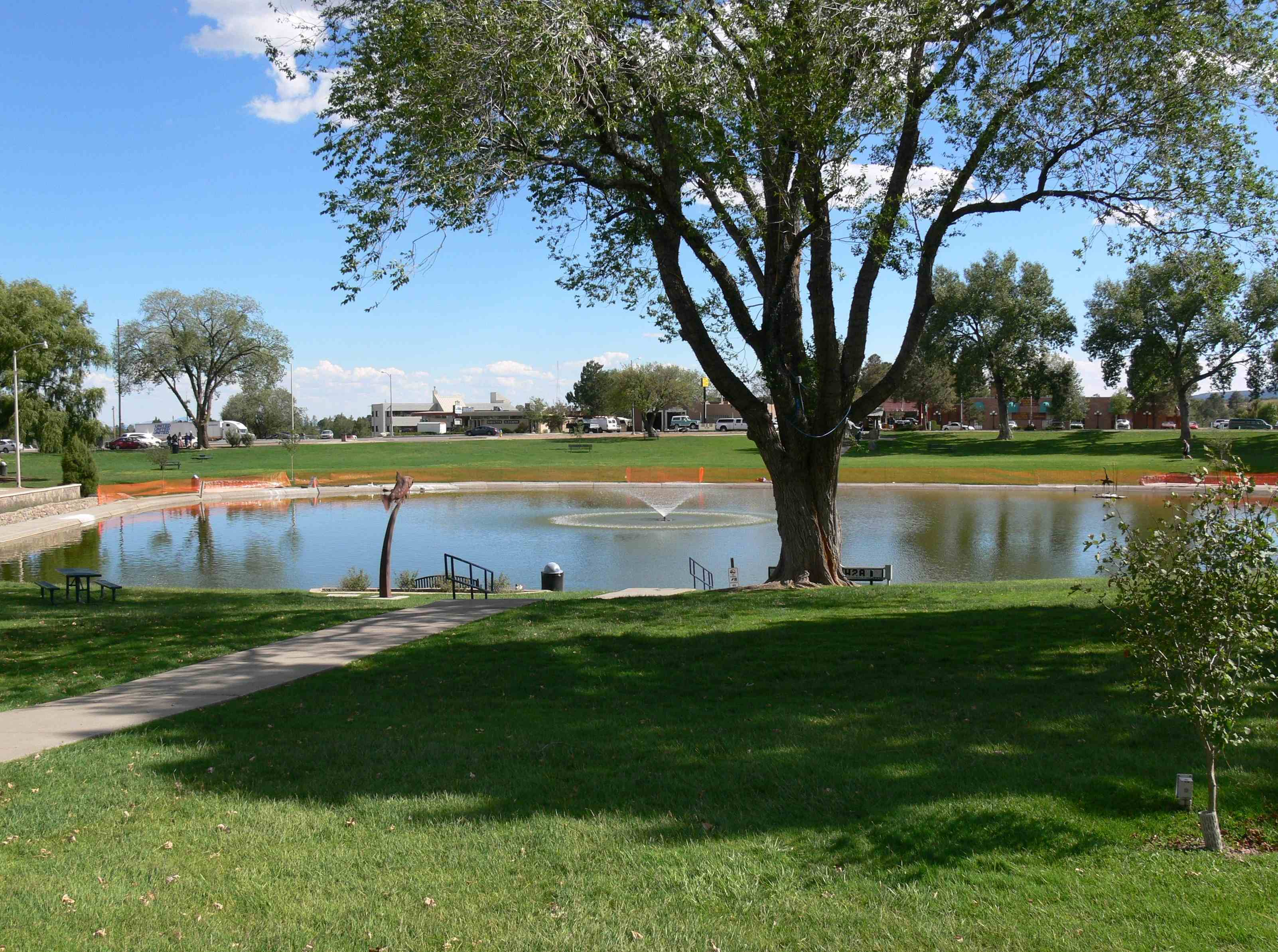 Ashley Pond in Los Alamos (New Mexiko)